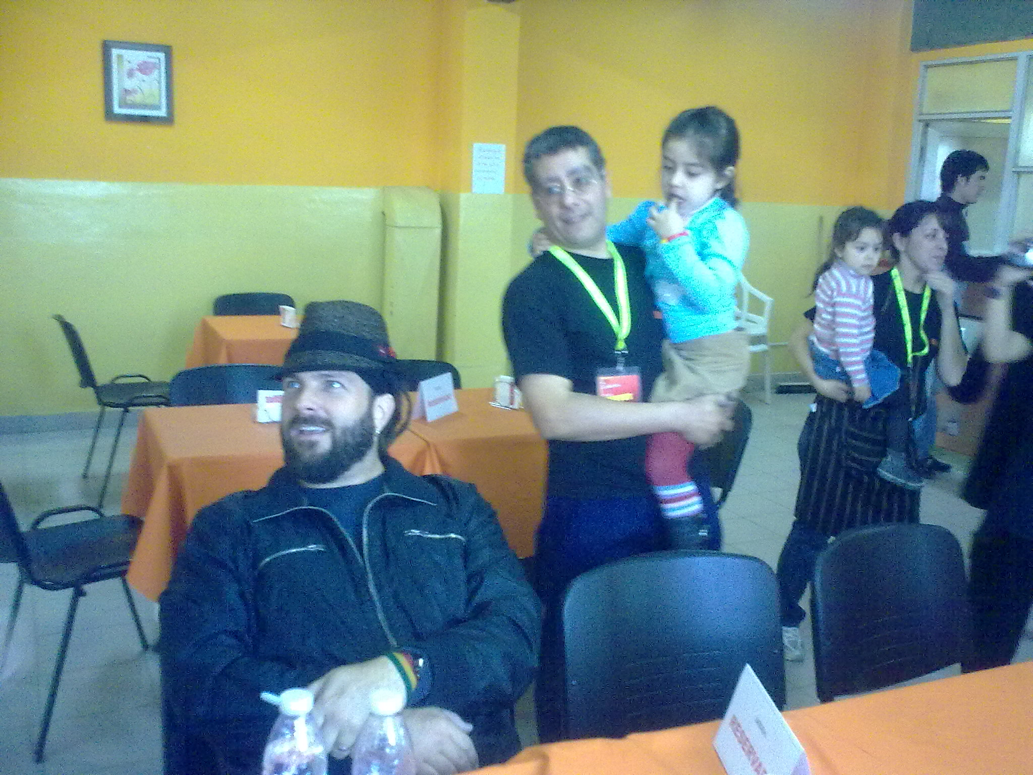 el cantante de la banda crhistafaria y su hija en el tabernaculo de comodoro rivadavia